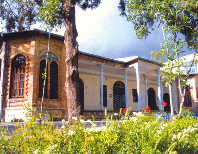 کاخ فلاحتی ایلام